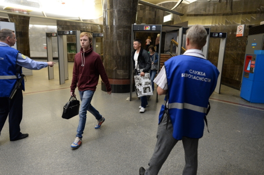 Служба безопасности и рамки металлодетекторов в вестибюле станции Московского метро